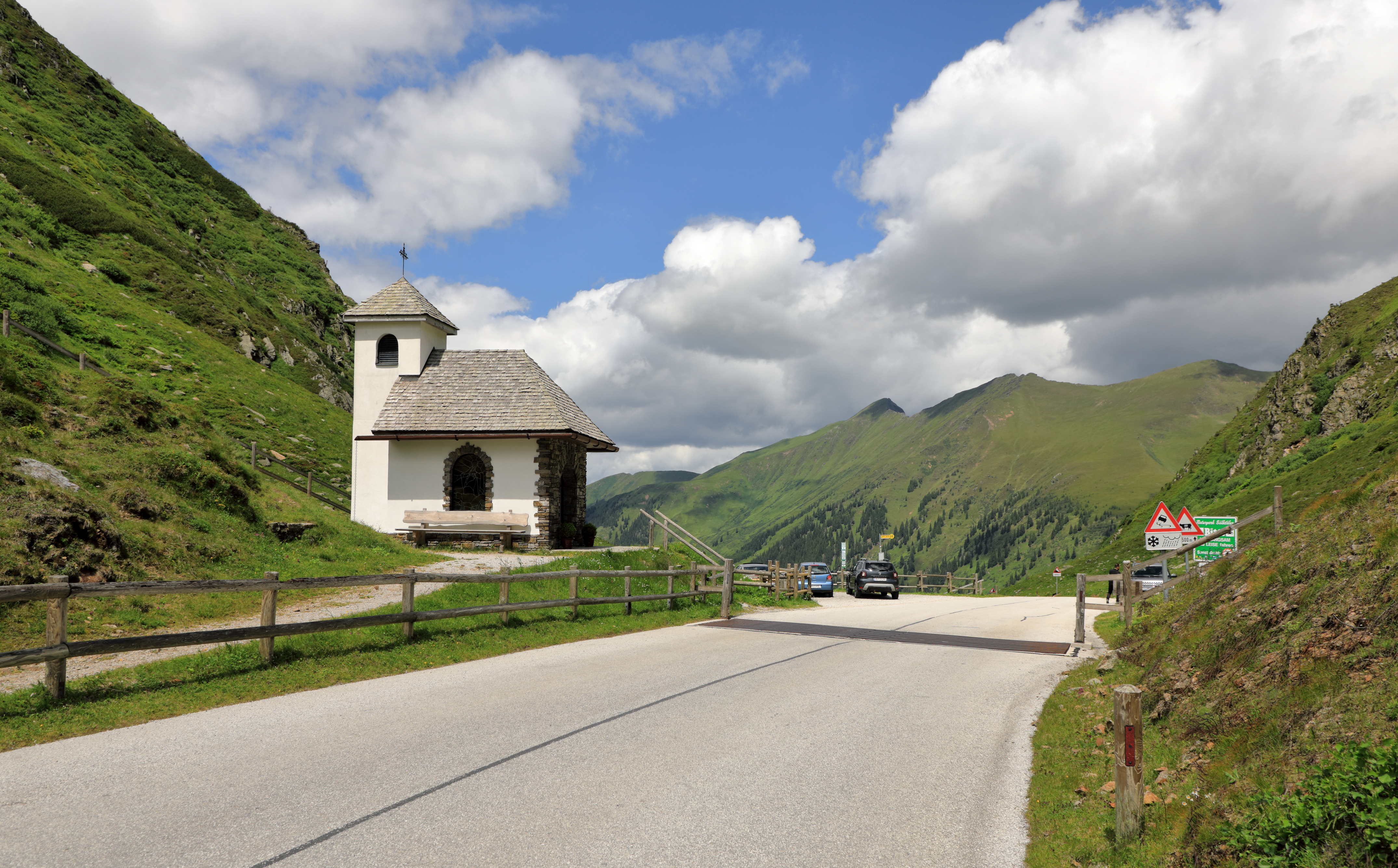 Scheitelpunkt der Sölkpassstraße bzw. Erzherzog-Johann-Straße in der Steiermark (Österreich) mit Blick Richtung Norden und mit der 1978 errichteten Kapelle.